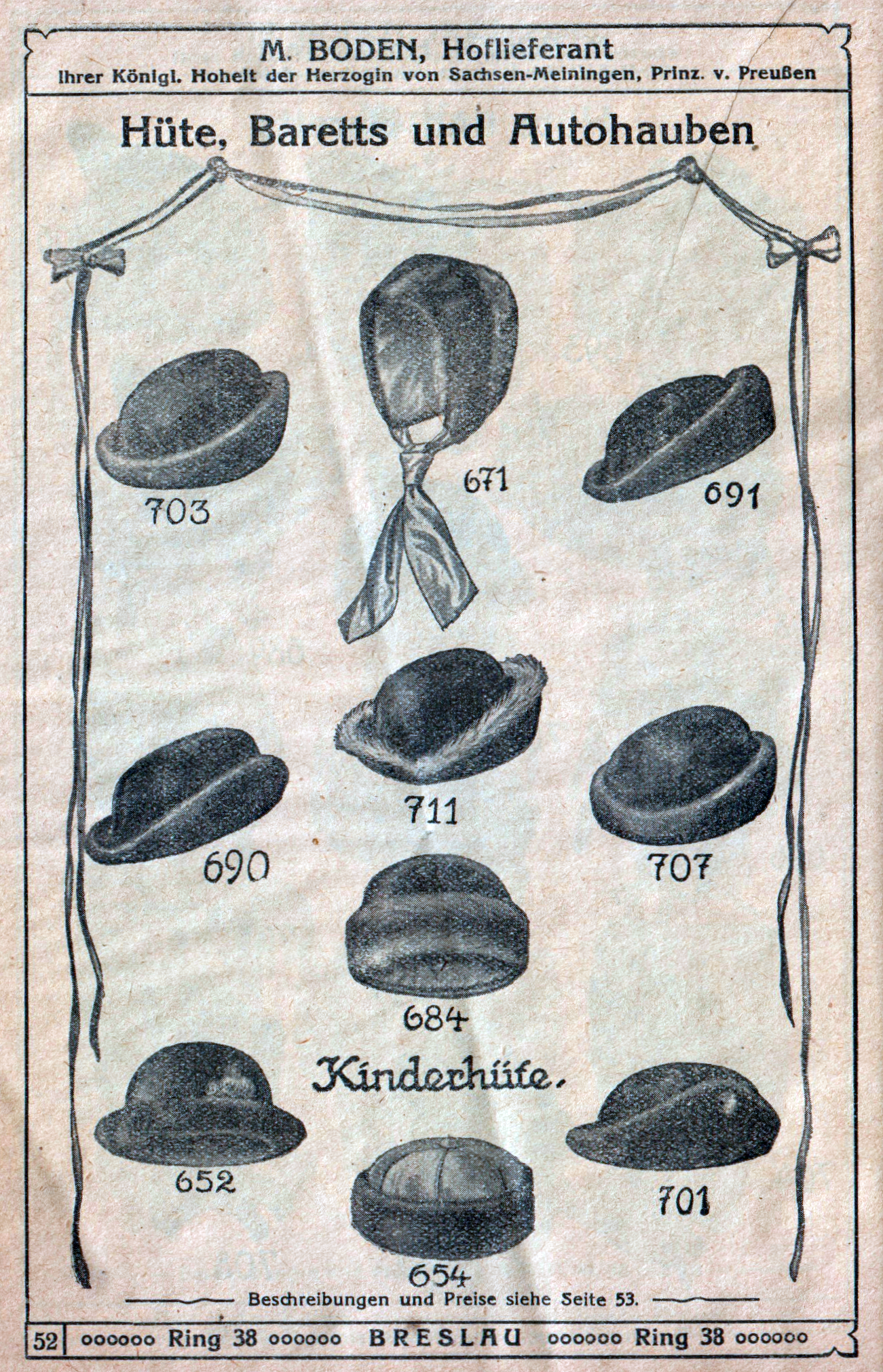 M. Boden, Breslau, Ring 38. Winter 1917/18 (Katalog).